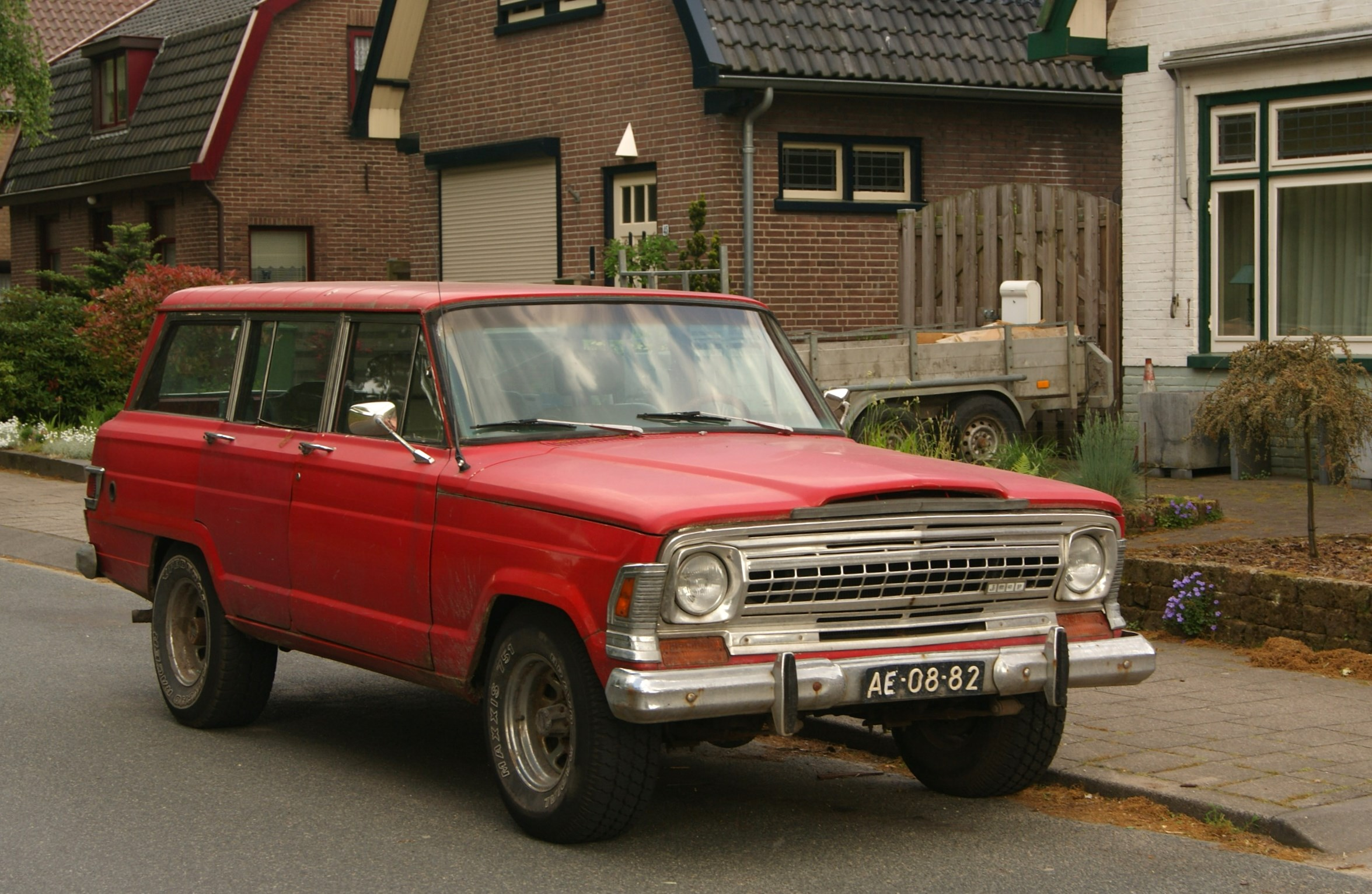 AE-08-82